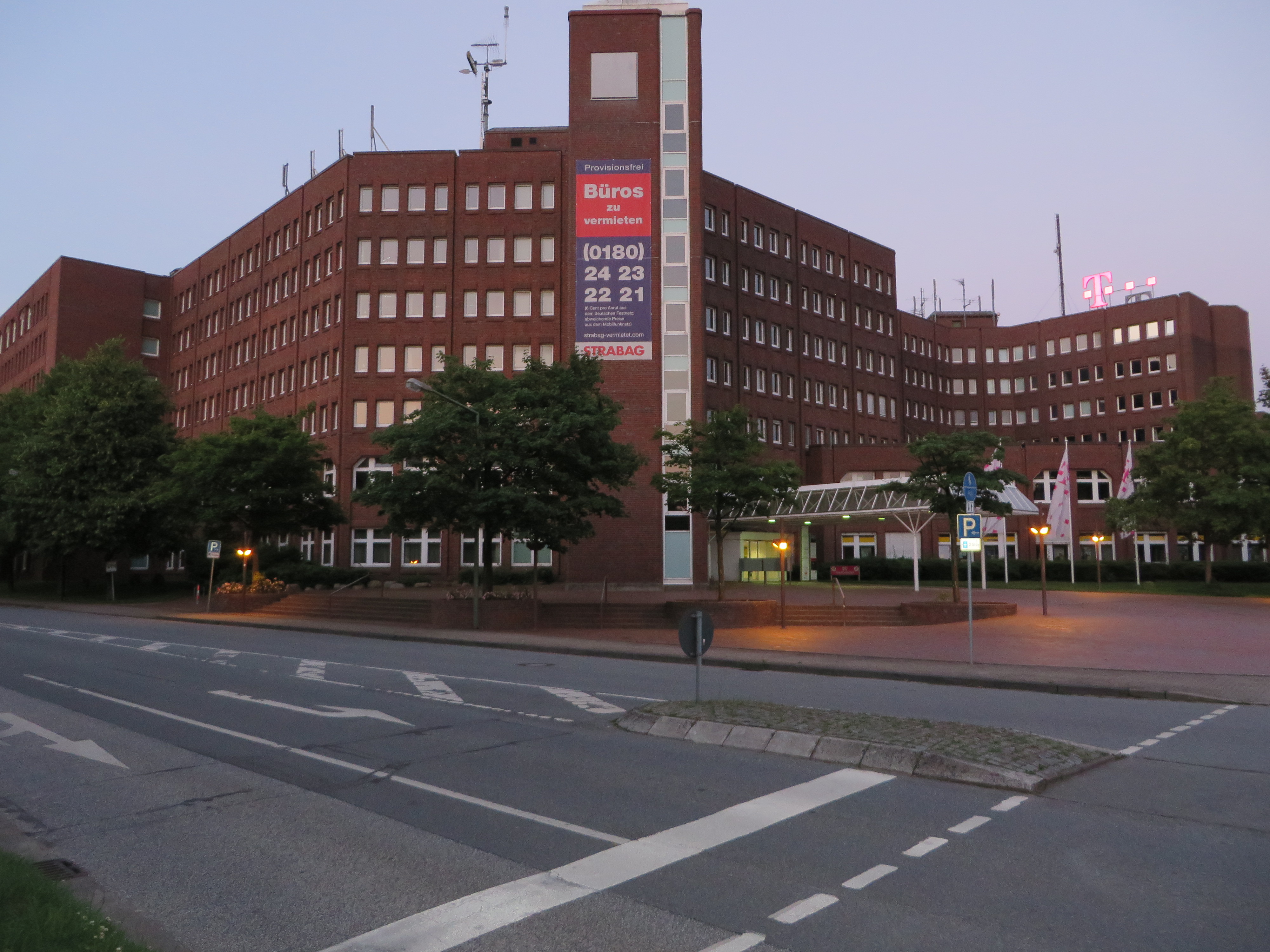 Telekomgebäude, Eckernförder Landstraße 65 (Flensburg Juli 2014), Bild 01